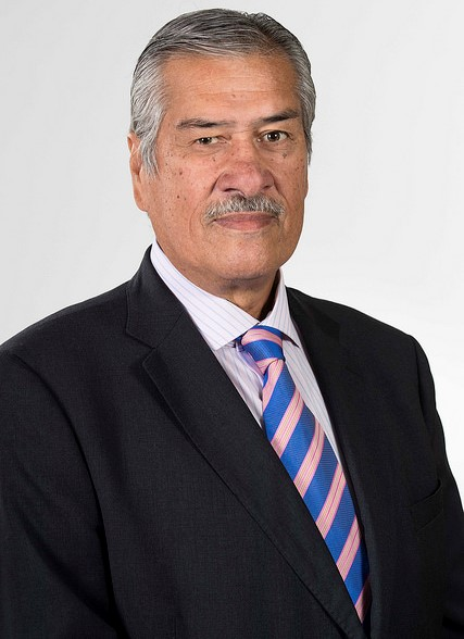 Fernando Meza Moncada en la fotografía oficial de diputados periodo 2018-2022. (Fotos: Christel Andler, René Lescornez, Johanna Zárate)